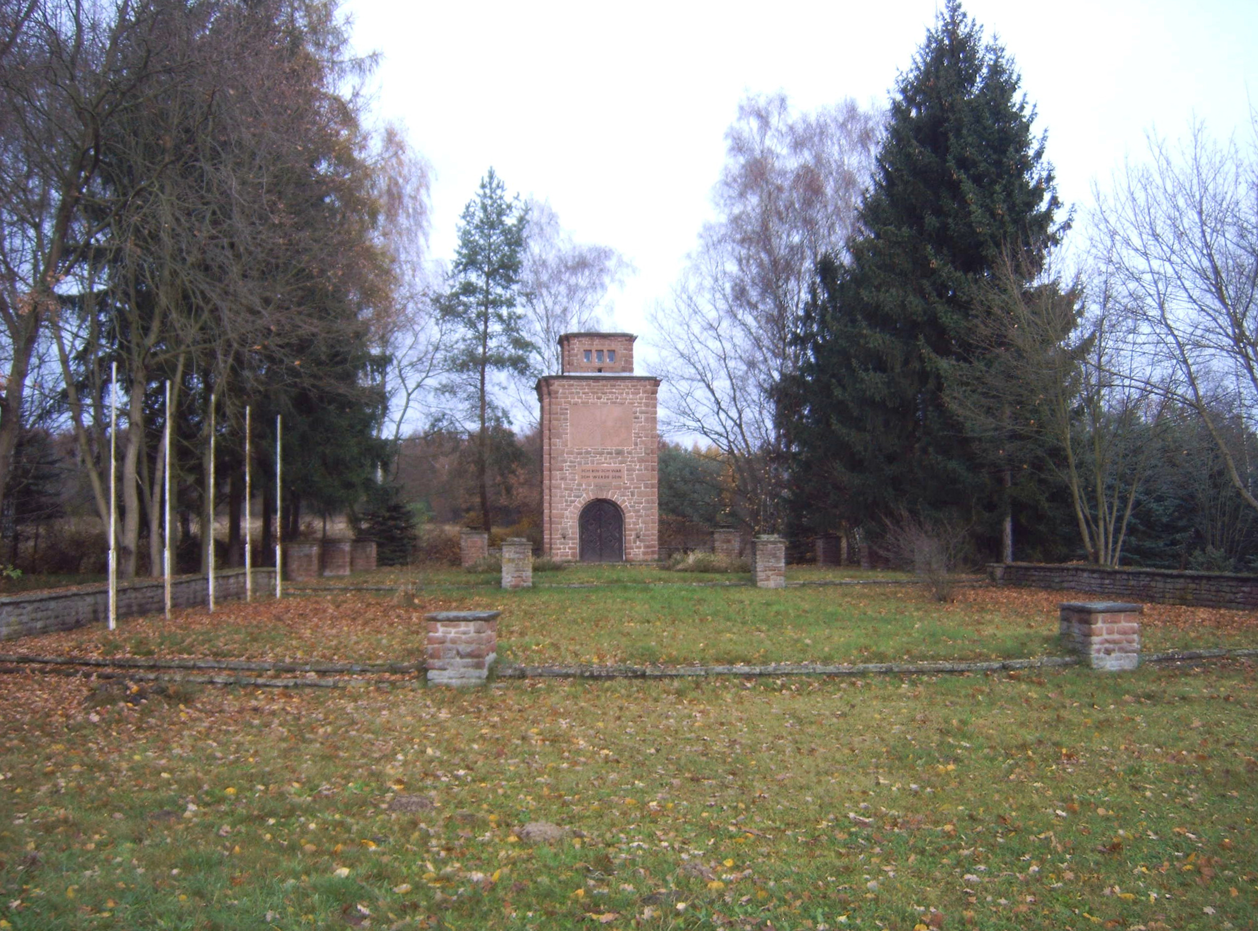 Mahnmal an den faschistischen Terror in Dolle, Sachsen-Anhalt